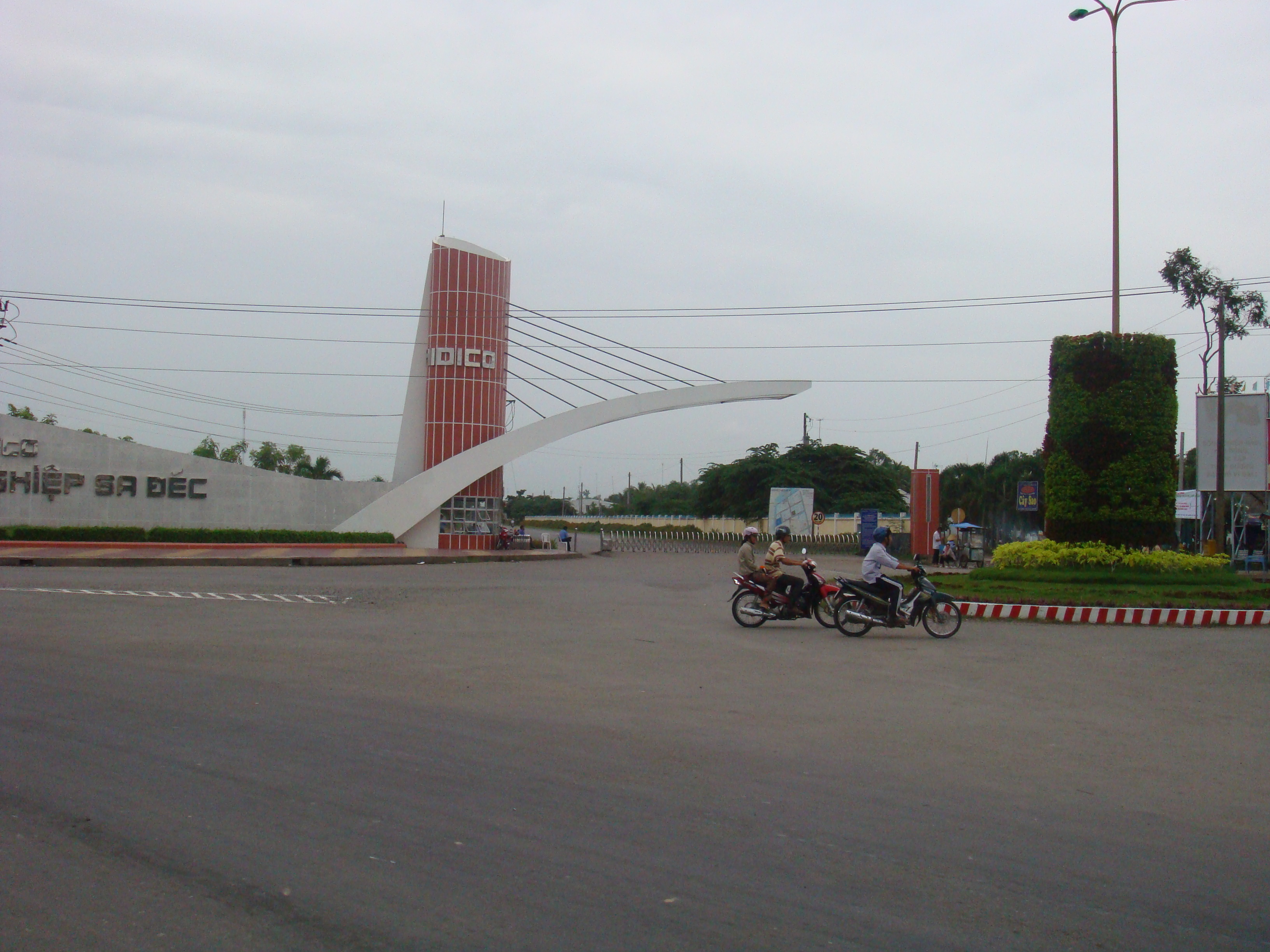 Sa Dec Industrial zone